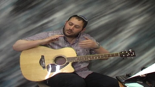 הגיטריסט יוסף זילברברג מלמד גיטרה